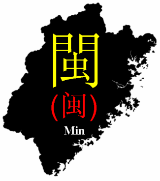 Map of Fujian